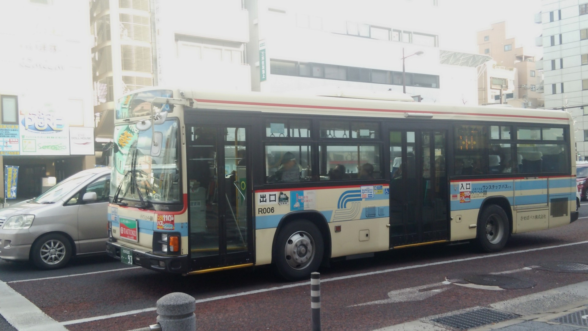 させぼバスの車両